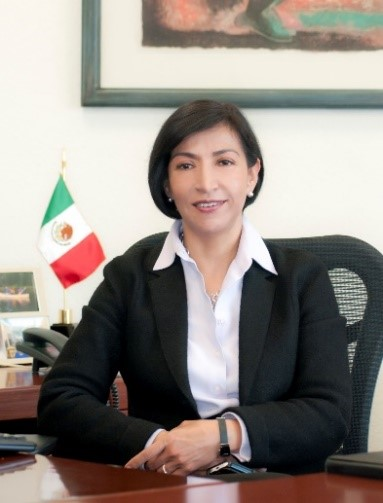 Mujeres diplomáticas de México.